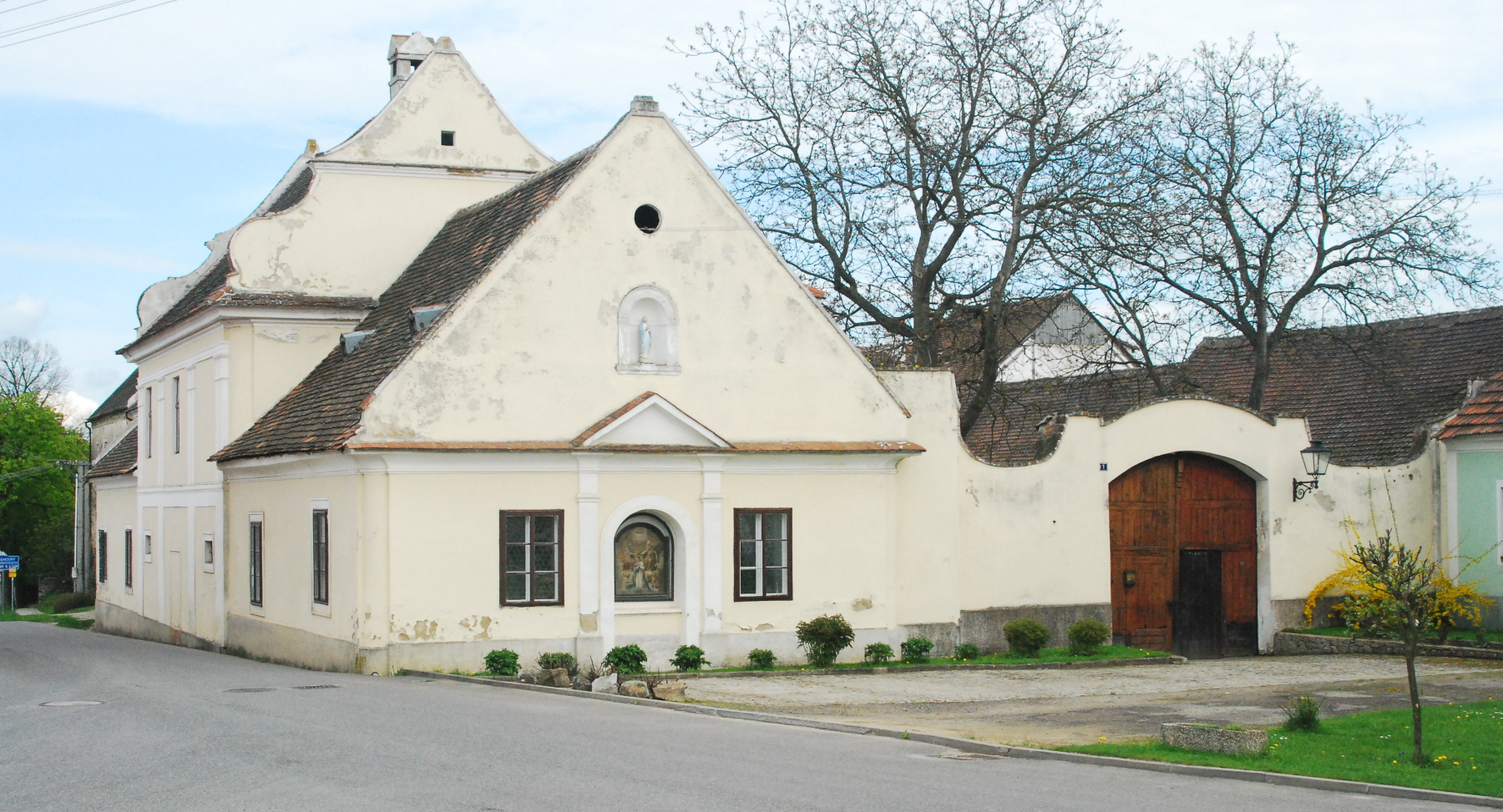 Das so genannte Schlösschen in Vratěnín